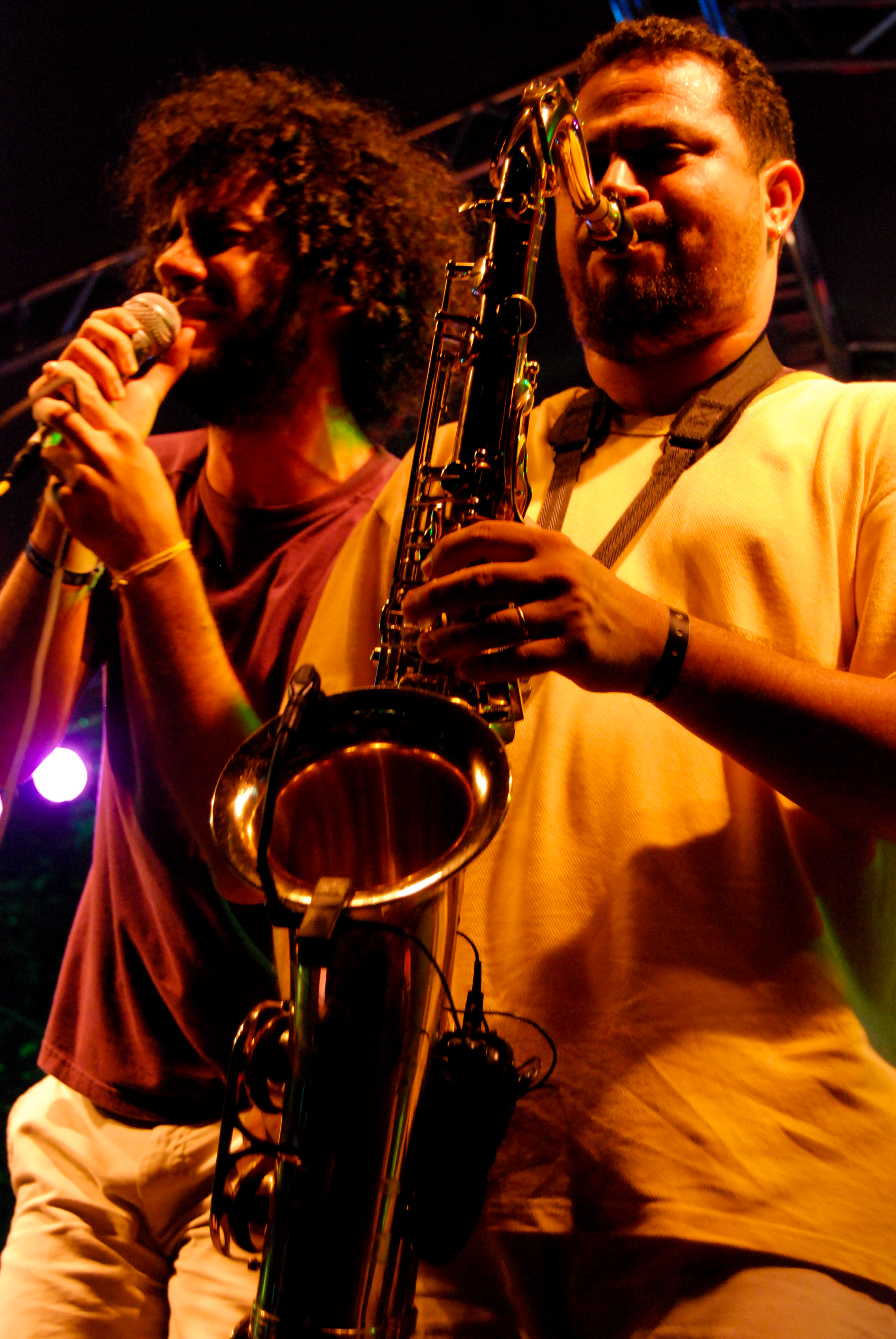 Foto de Paulo Rogério e de André, integrantes da Banda Móveis Coloniais de Acaju, tirada por Talita Oliviera